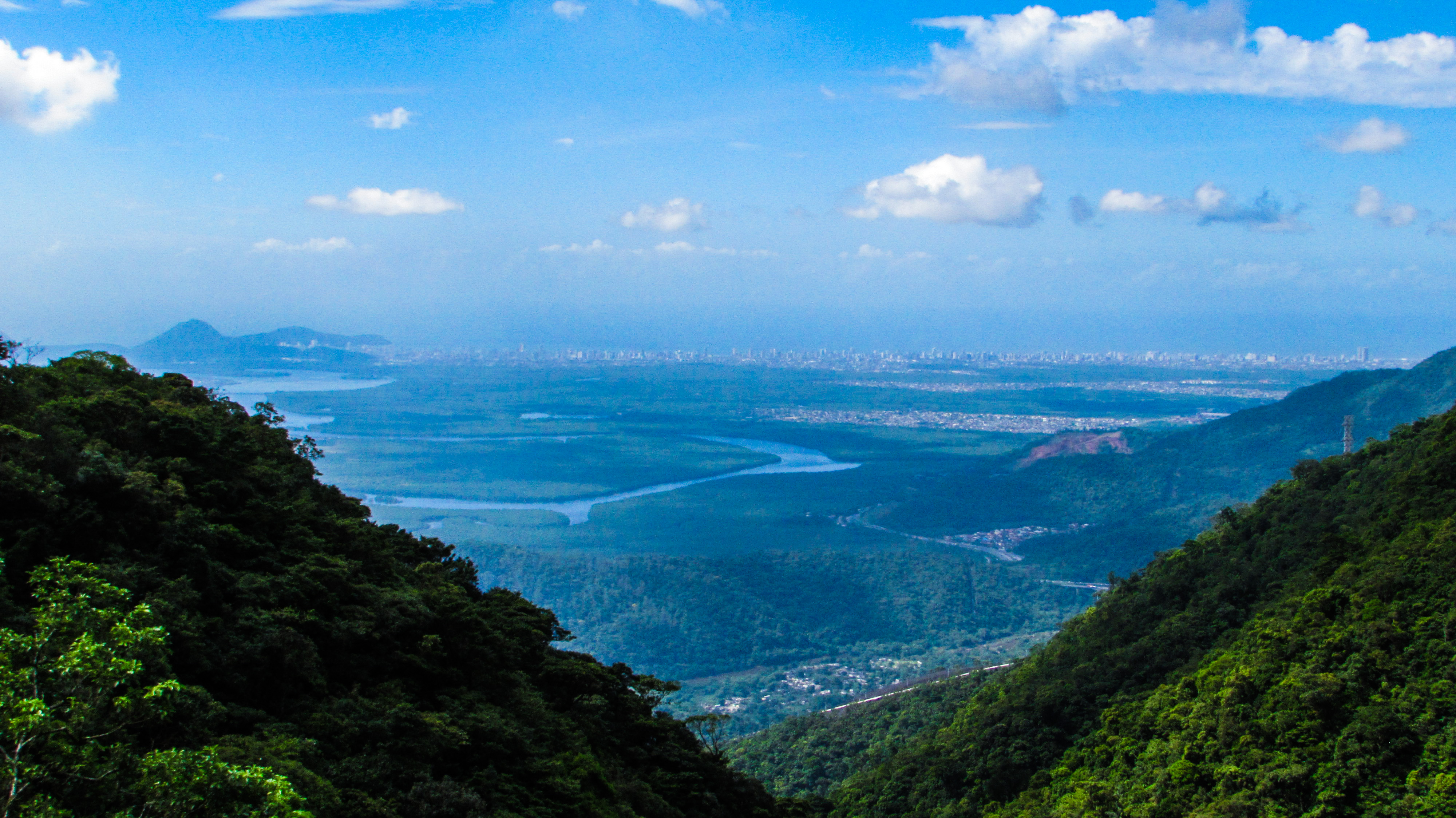 Litoral de São paulo visto pelo pouso paranapiacaba